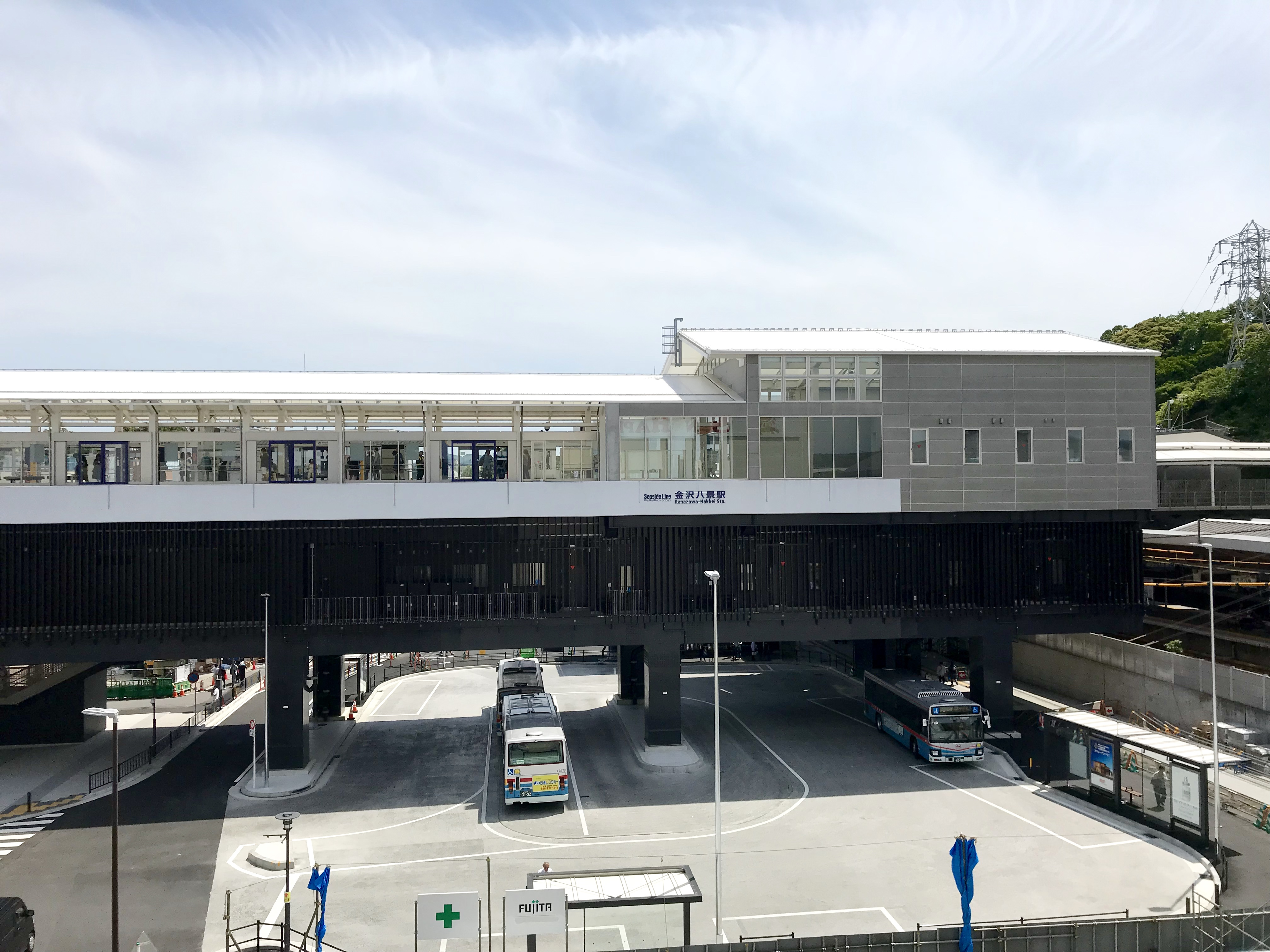 京急・シーサイドライン金沢八景駅駅舎